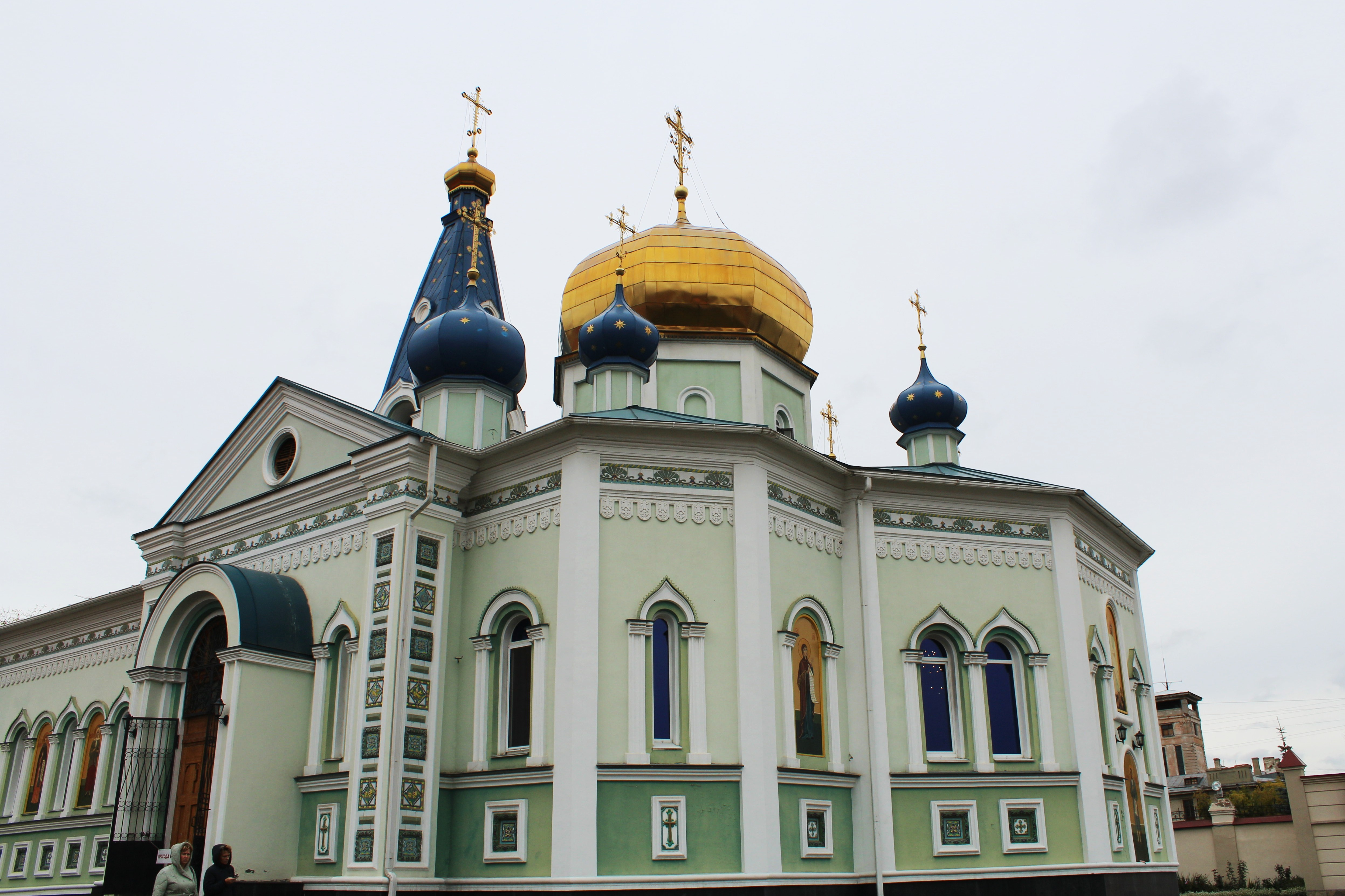 Семеновская церковь (Челябинская область, Челябинск, кыштымская улица)